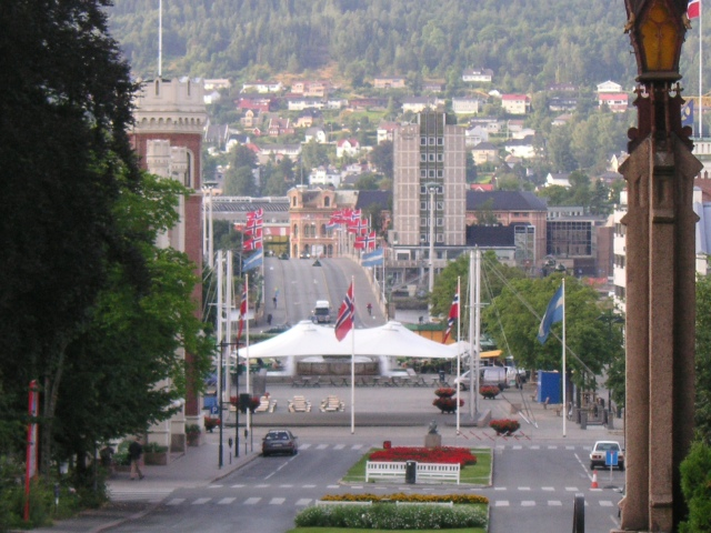 Drammen mit Brücke